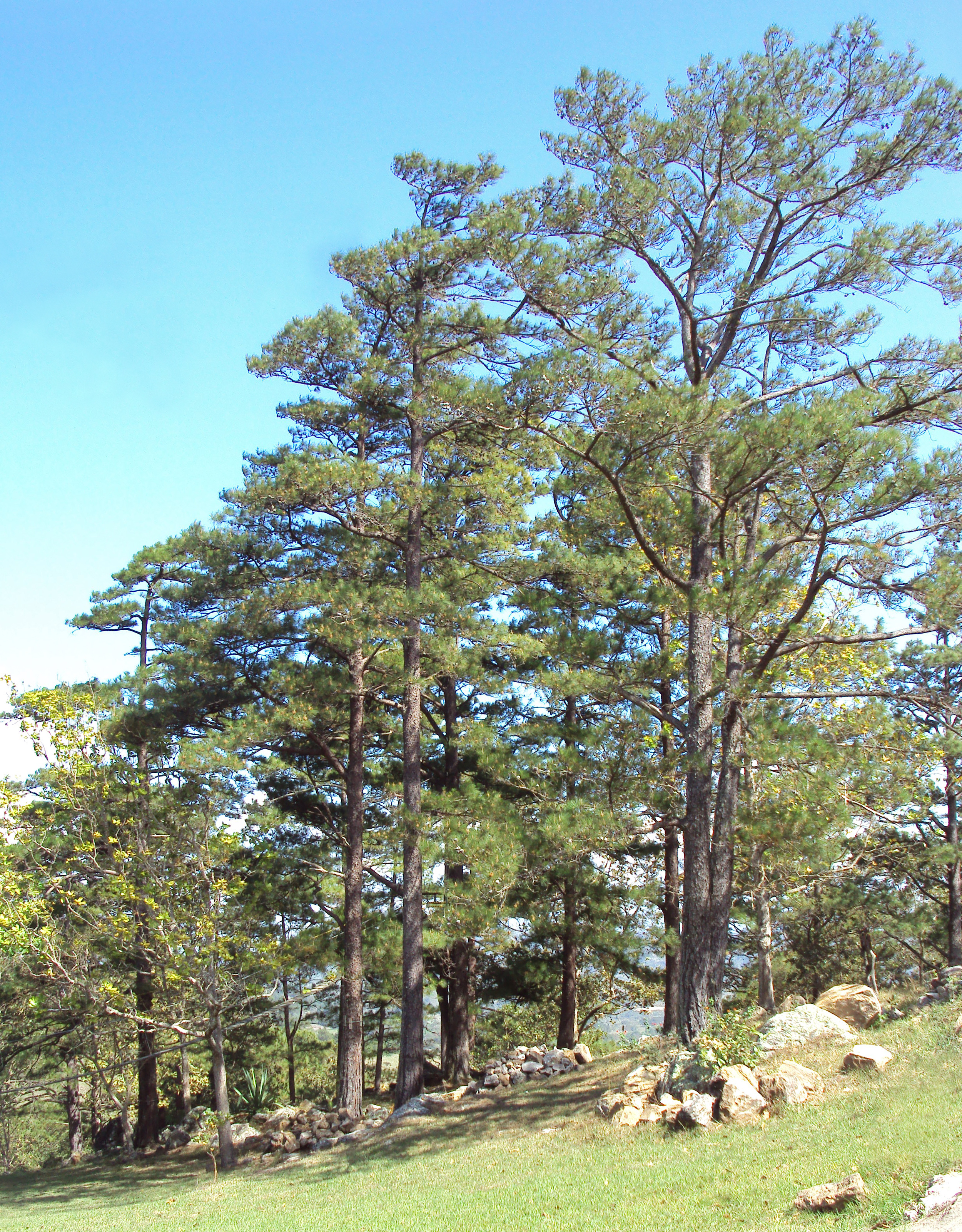 Canopy la brellera, san rafael del norte